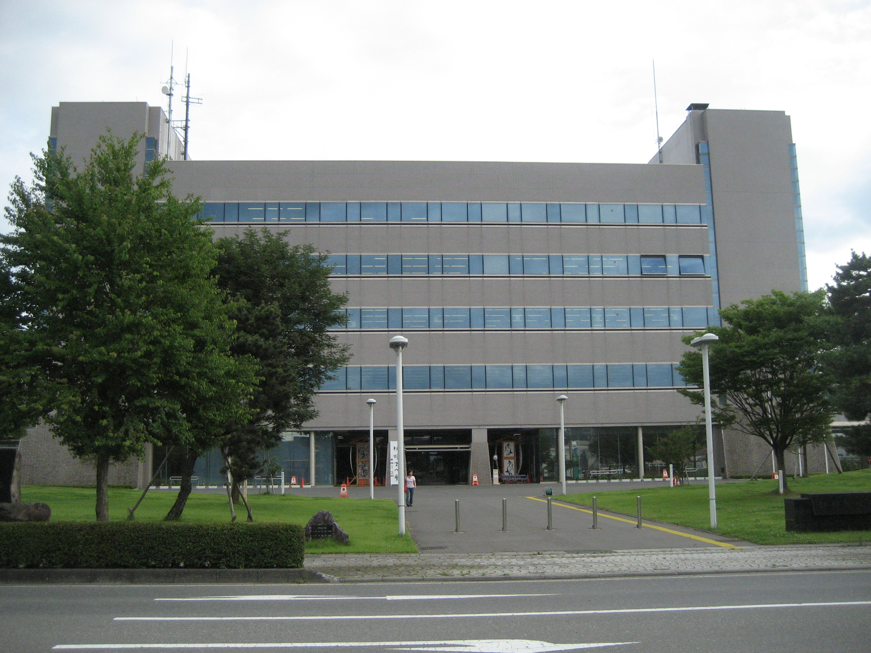 長野県伊那市役所庁舎